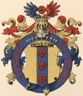 Benckendorffi suguvõsa krahvivapp